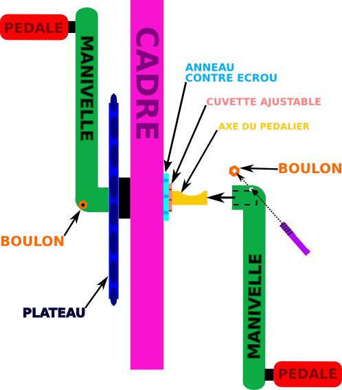 Schema couleur d'un pédalier de velo, montage de la manivelle de la pedale.